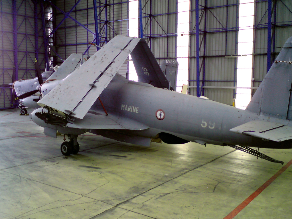 L'Alizé numéro 59, actuellement en cours de remise en état de vol. Photographie prise à la BAN Nîmes-Garons.